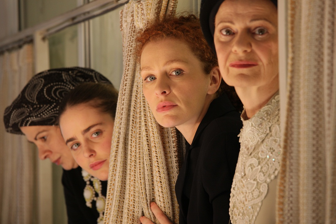 למלא את החלל 2. צילום קארין בר